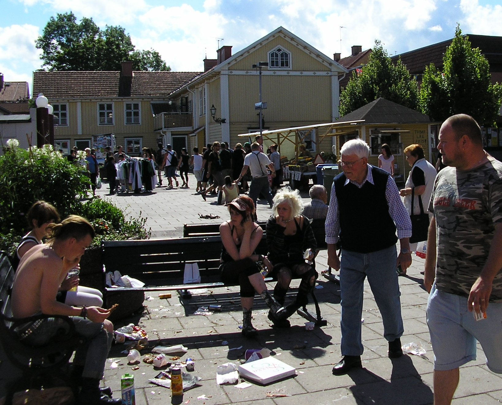 Central Lindesberg during Augustibuller 2007.